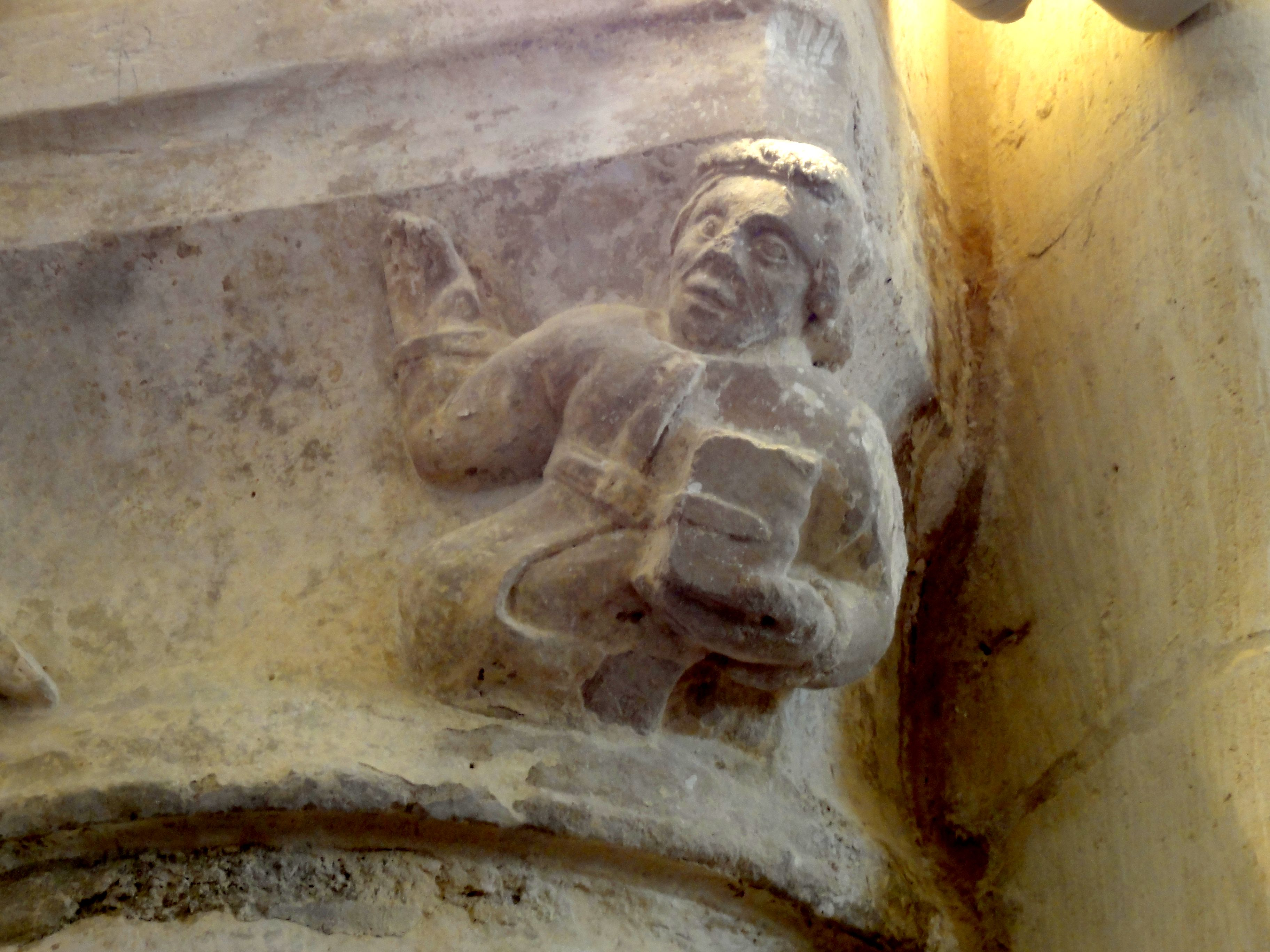 Croisée, arcade sud, détail du chapiteau ouest.